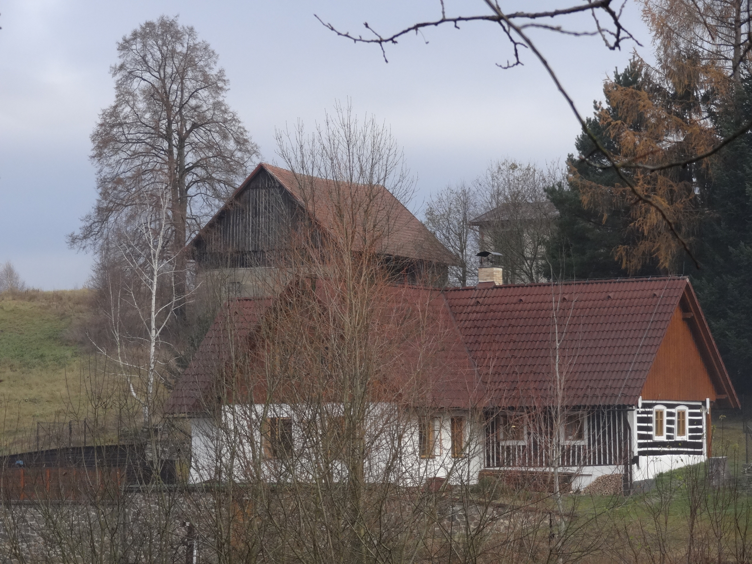 Proseč (na Semilsku, obec Záhoří) - čp. 10, v pozadí čp. 34